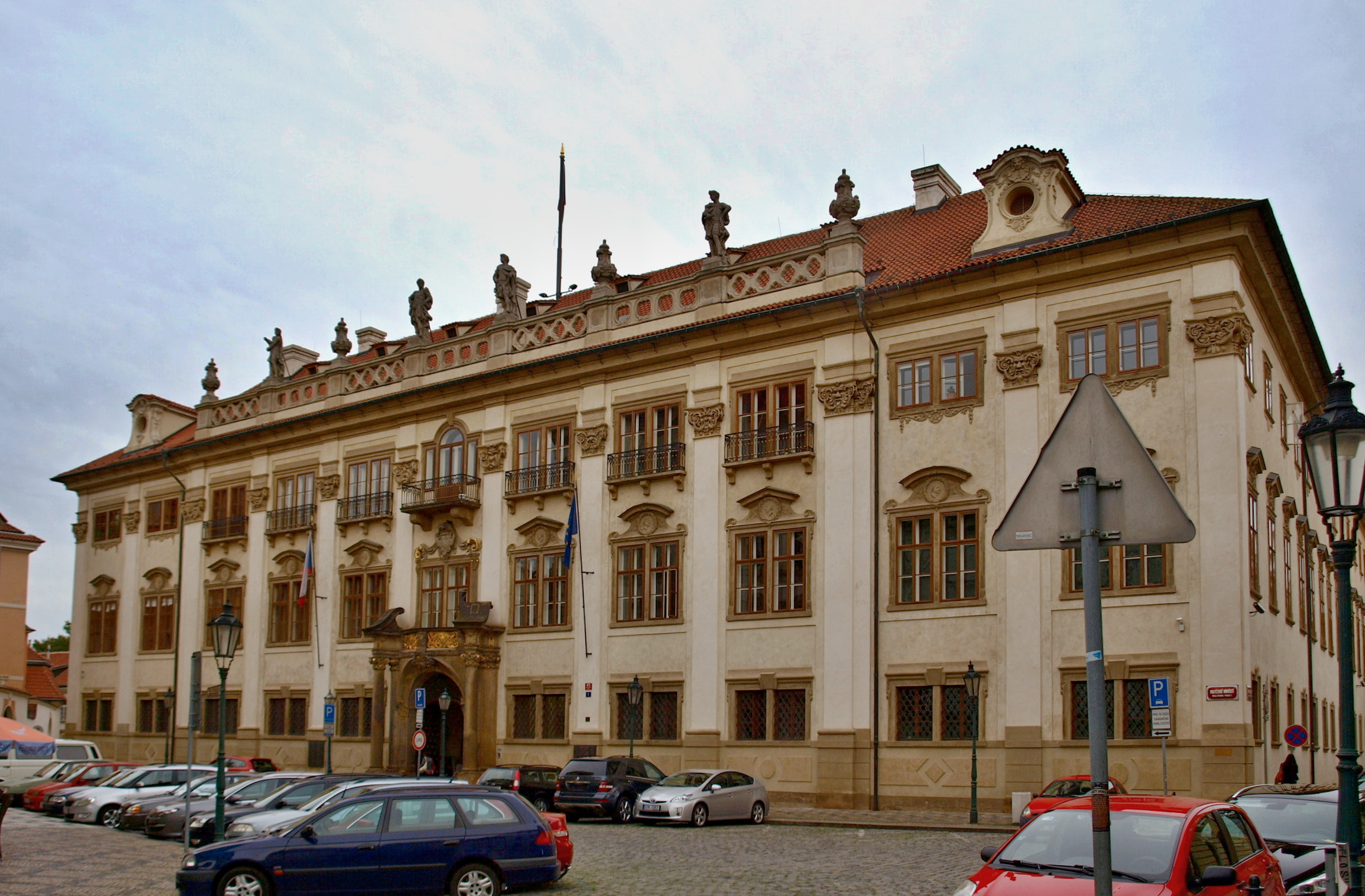 Nosticův palác